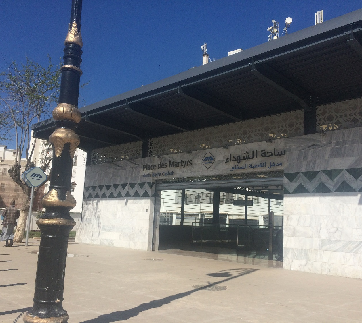 Accès secondaire de la station Place des Martyrs du métro d'Alger